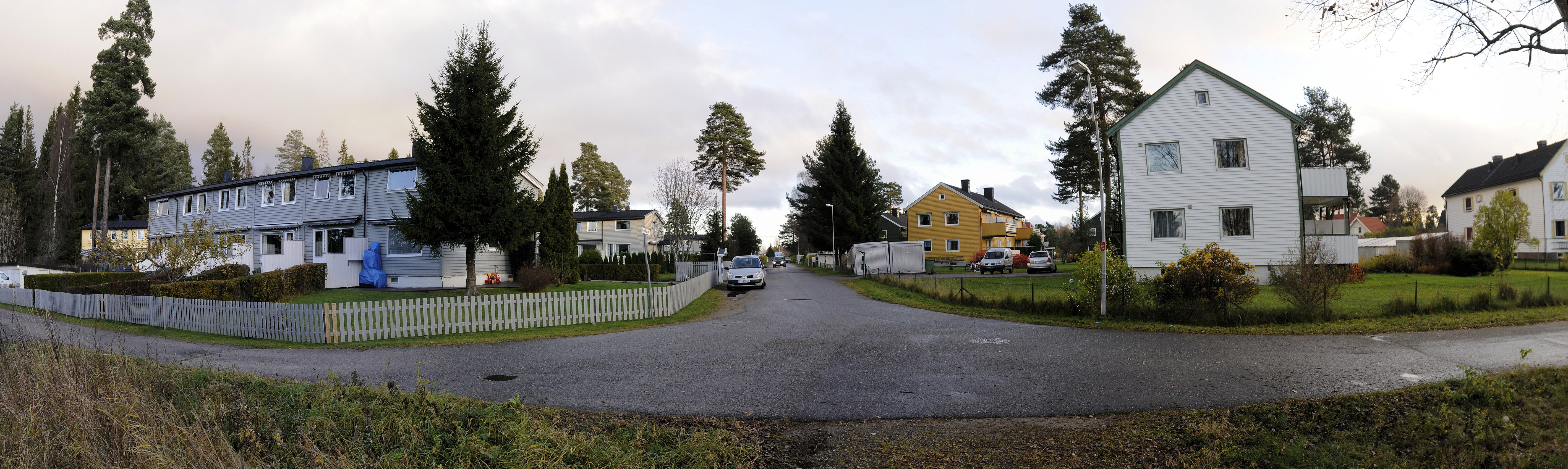 Gjestadhagen på Jessheim